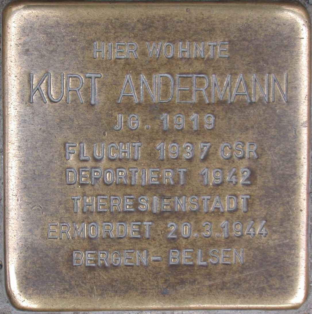 Deutschland - Nordrhein-Westfalen - Kreis Lippe - Bad Salzuflen: Stolperstein zur Erinnerung an Kurt Andermann